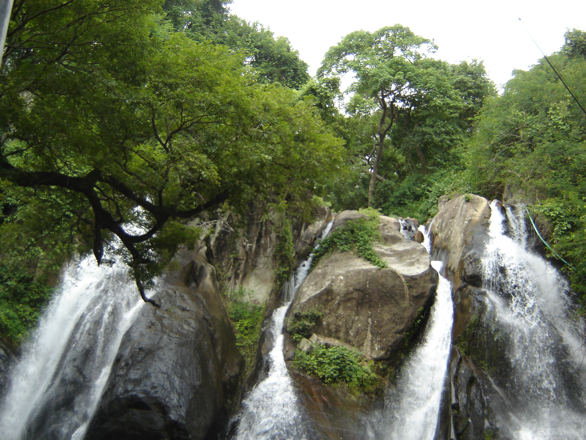 ஐந்தருவி